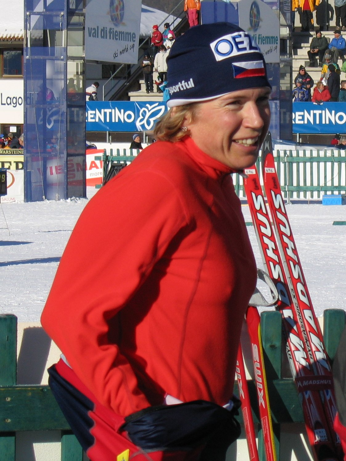 Czech skier Katerina Neumannova.